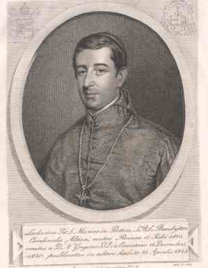 Der Kardinal und Bischof der römischen Dözese Albano Lodovico Altieri (1805-1867)